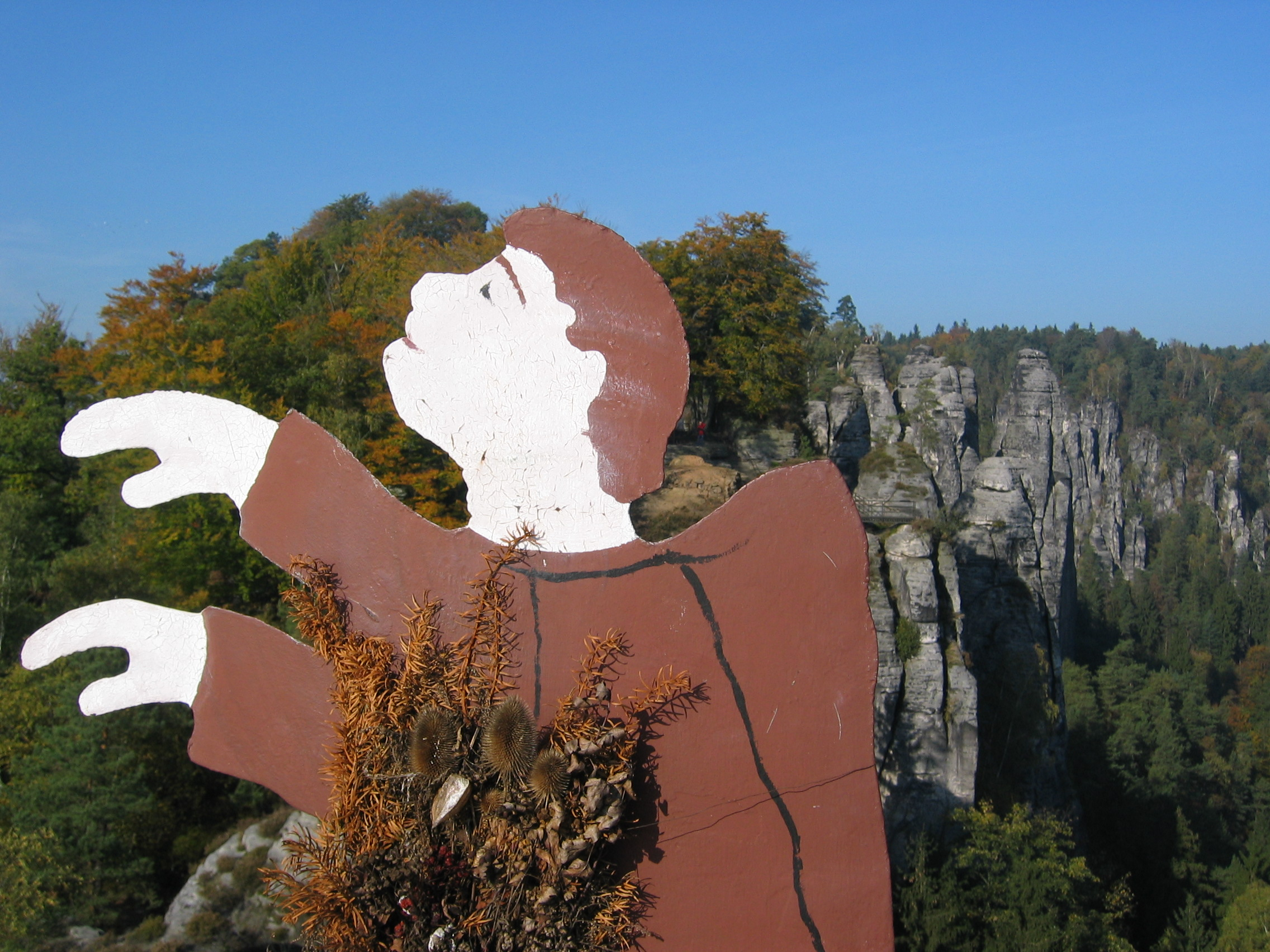 Der Mönch (Blechfigur) auf dem Mönch (Fels)